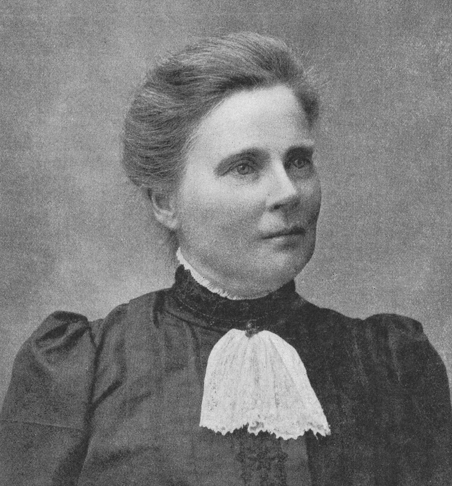 Elisabeth Anrep-Nordin (1857-1947) på omslaget av Hvar 8 Dag 1909.